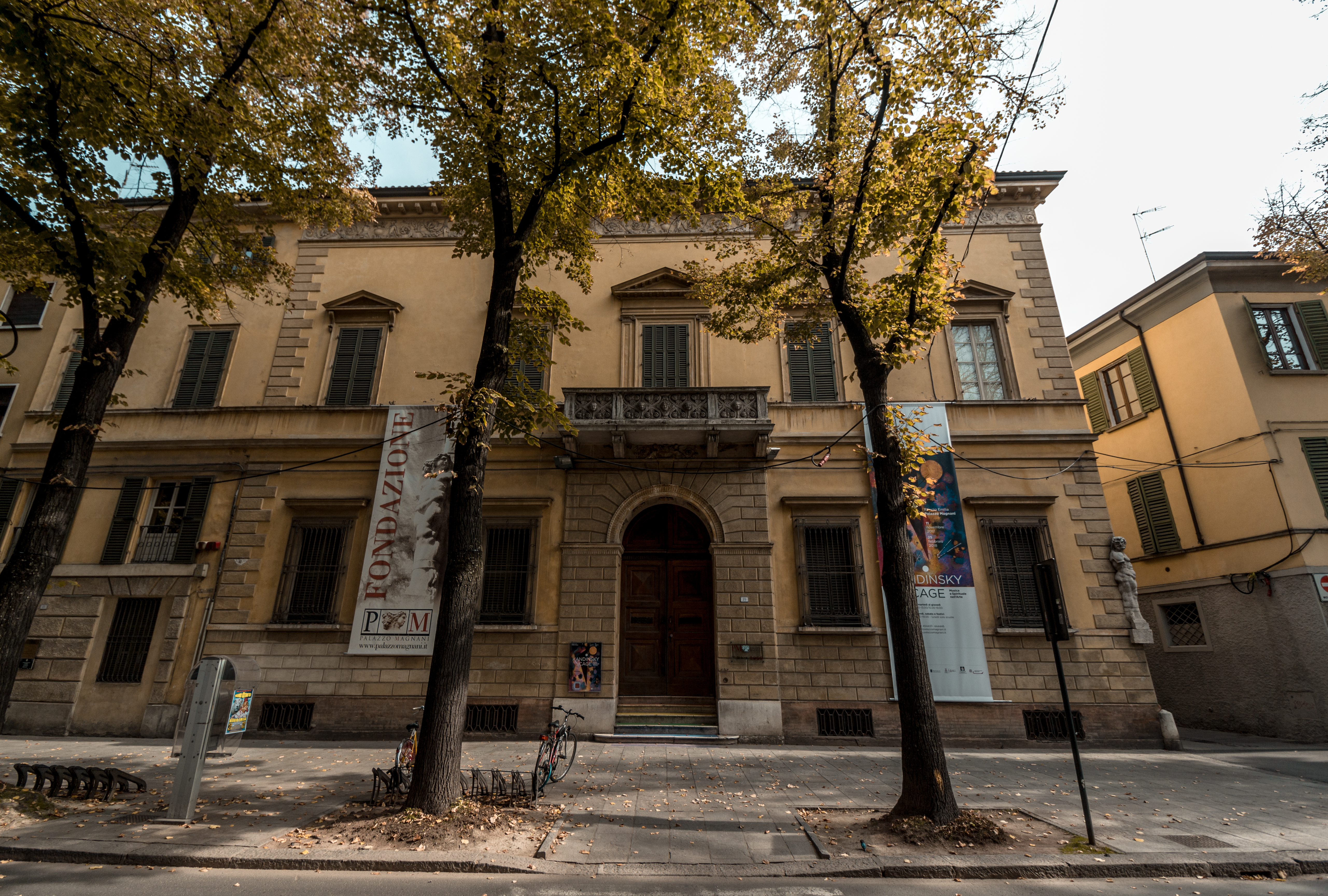 Palazzo Magnani presso Corso Giuseppe Garibaldi, 31, Provincia di Reggio Emilia. This is a photo of a monument which is part of cultural heritage of Italy.